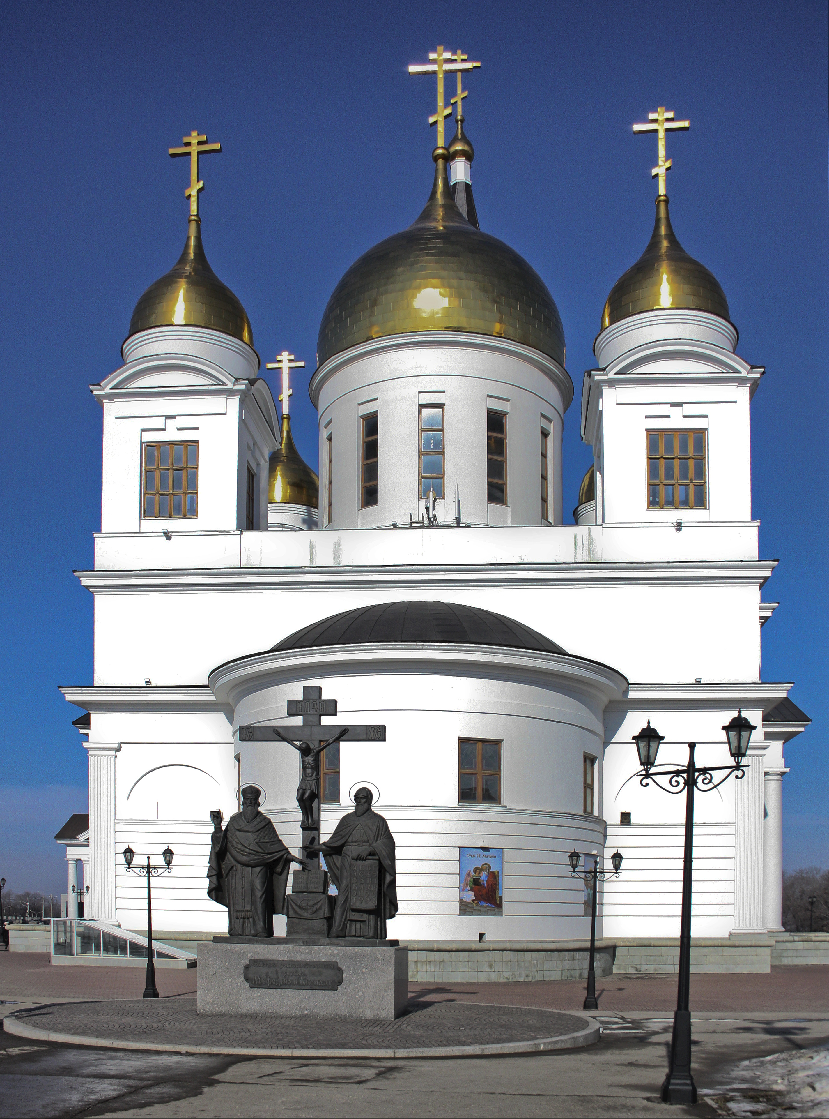 Самара, Собор равноапостольных Кирилла и Мефодия